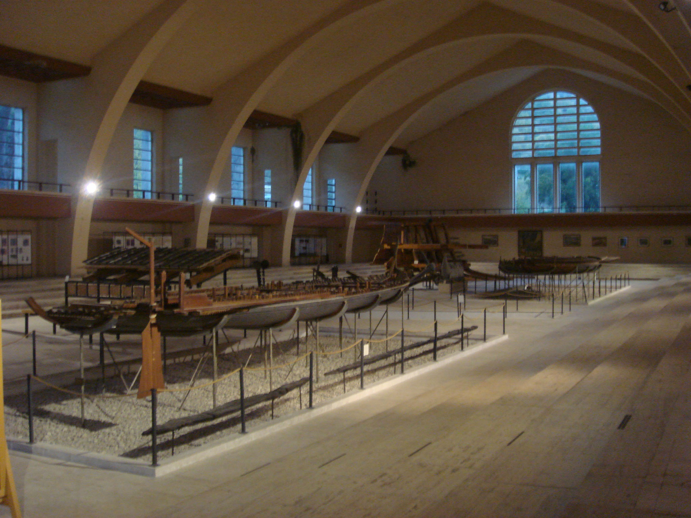 Museo delle Navi, Nemi, Roma